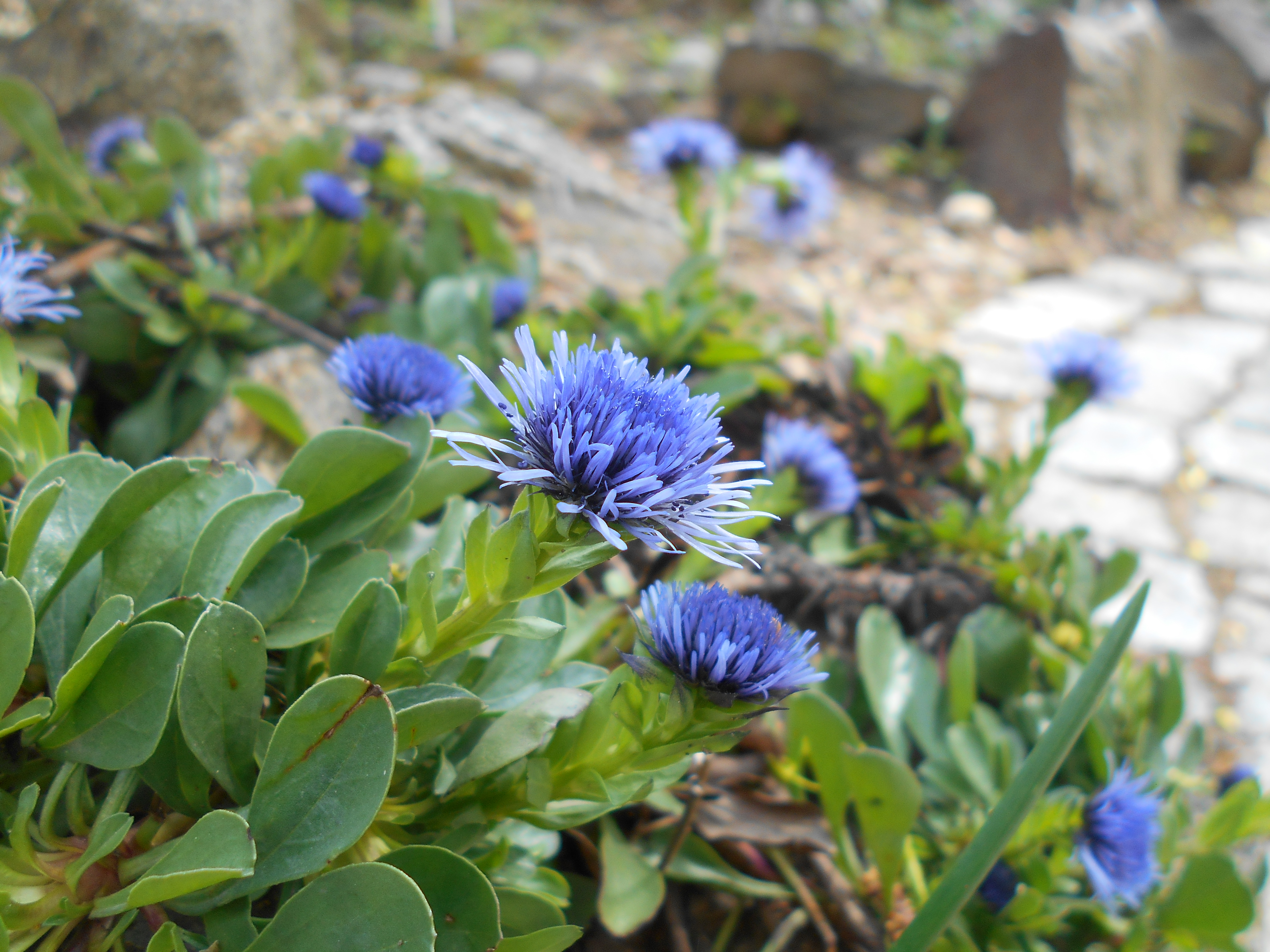 Kulnik włosokwiatowy (Globularia trichosantha), Ogród Botaniczny UMCS w Lublinie.